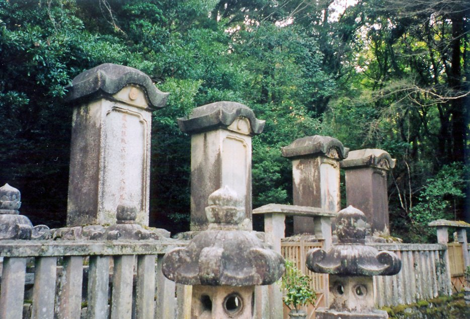 山口県萩市東光寺毛利家墓所内にある歴代藩主の墓。右端より7代重就と夫人の登代姫、11代斉元と夫人の由美姫。同寺は江戸時代、長州藩主毛利吉就によって創建され、以後毛利家の菩提寺となった。